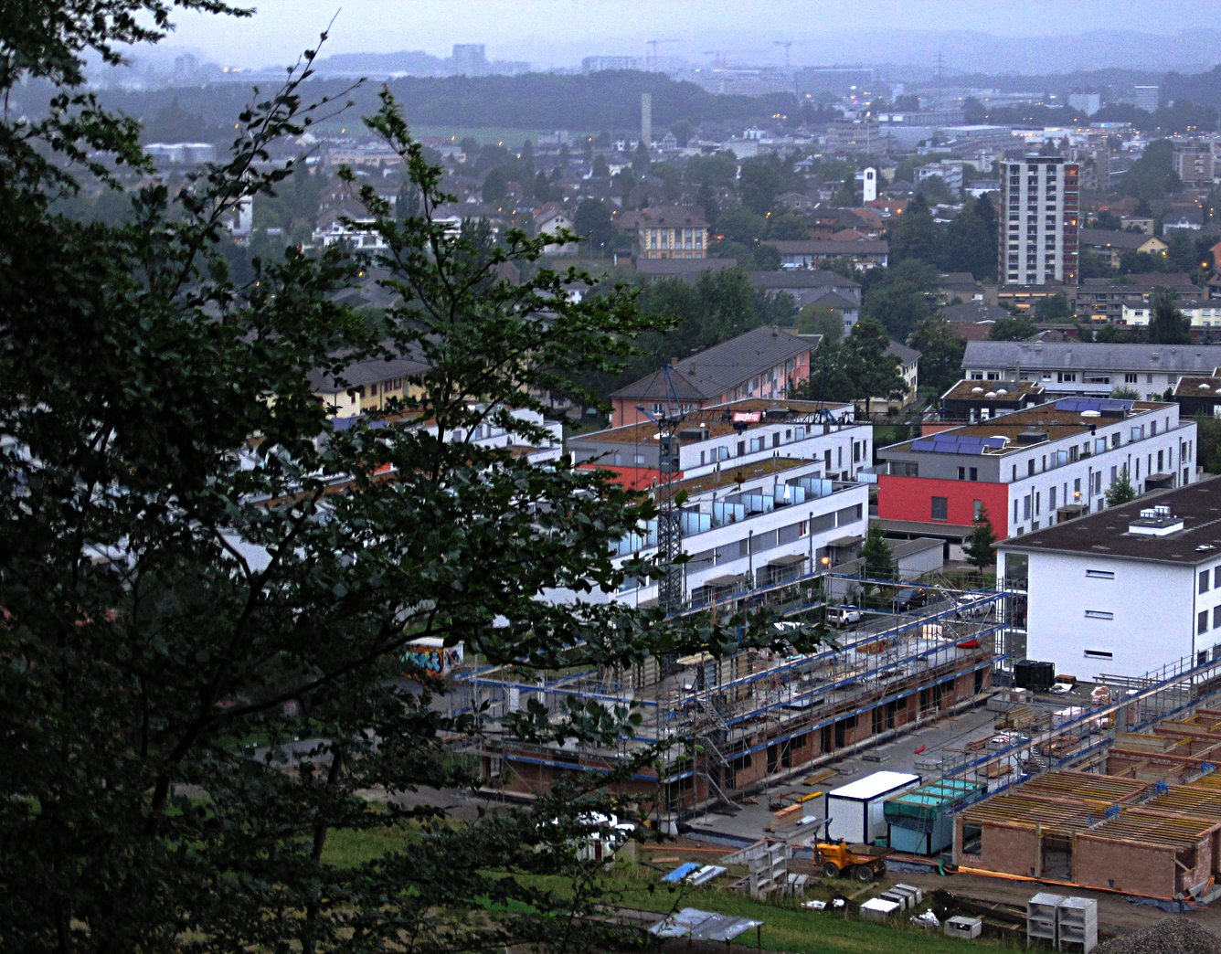 Der Rand von Ostermundigen